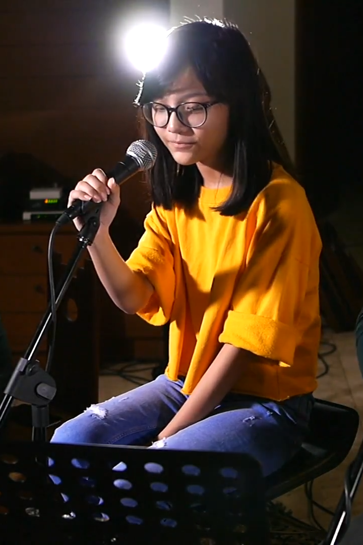 Misellia Ikwan di indomusikgram community menyanyikan ulang lagu Jangan Takut Gelap dari Tasya dan Duta.